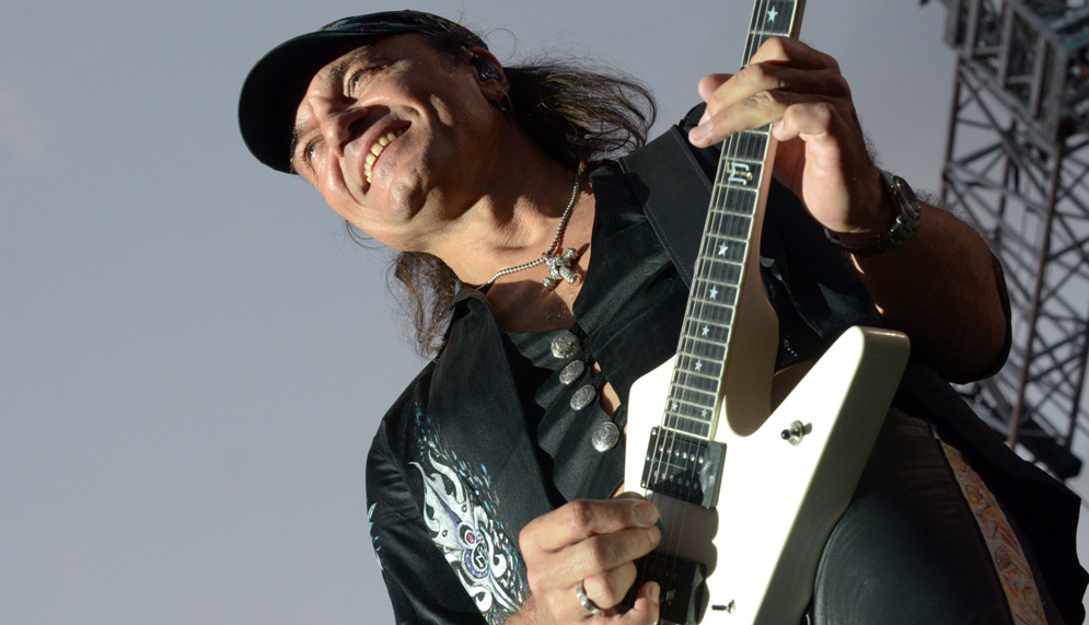 Matthias Jabs du groupe allemand Scorpions en 2015 pour le "Before" de Beauregard